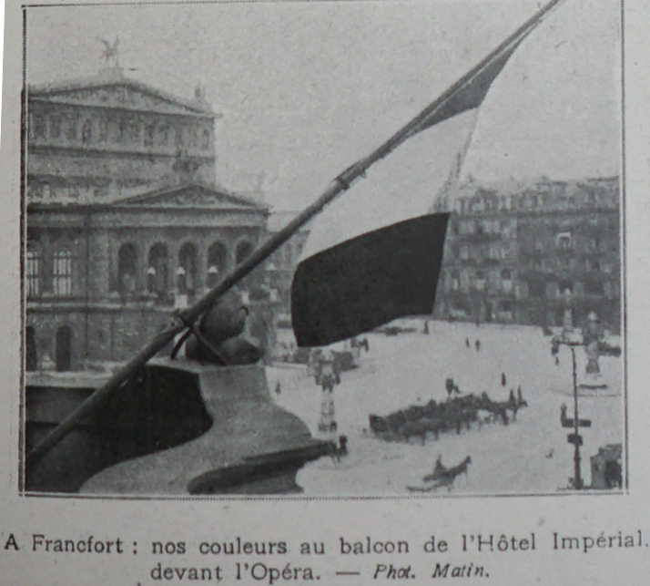 dans L'Illustration de 1920, des images des émeutes du 6 mai 1920.